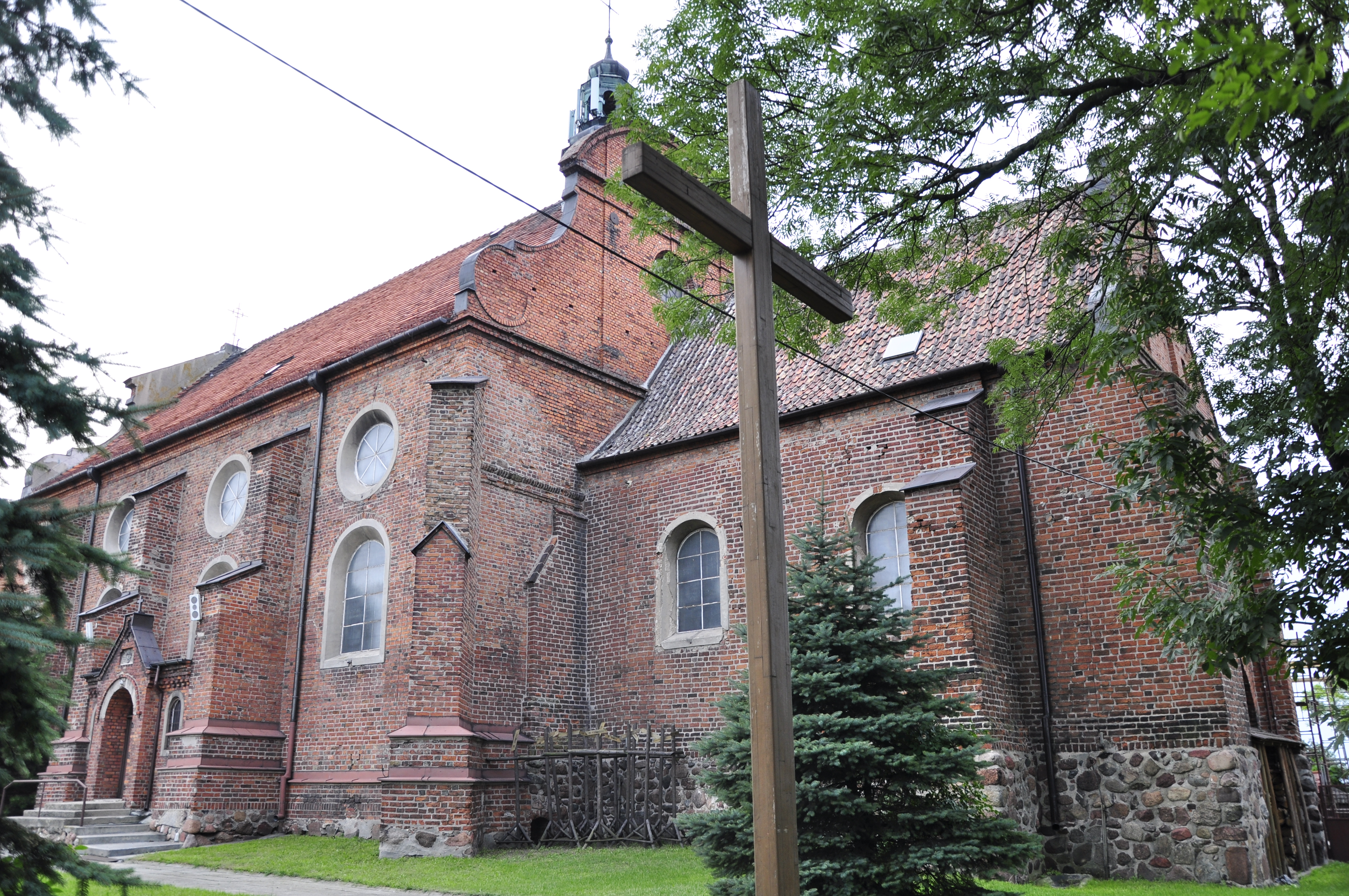 Radziejów - kościół parafialny p.w. Znalezienia Krzyża Świętego